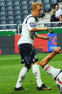 Simon Lundevall